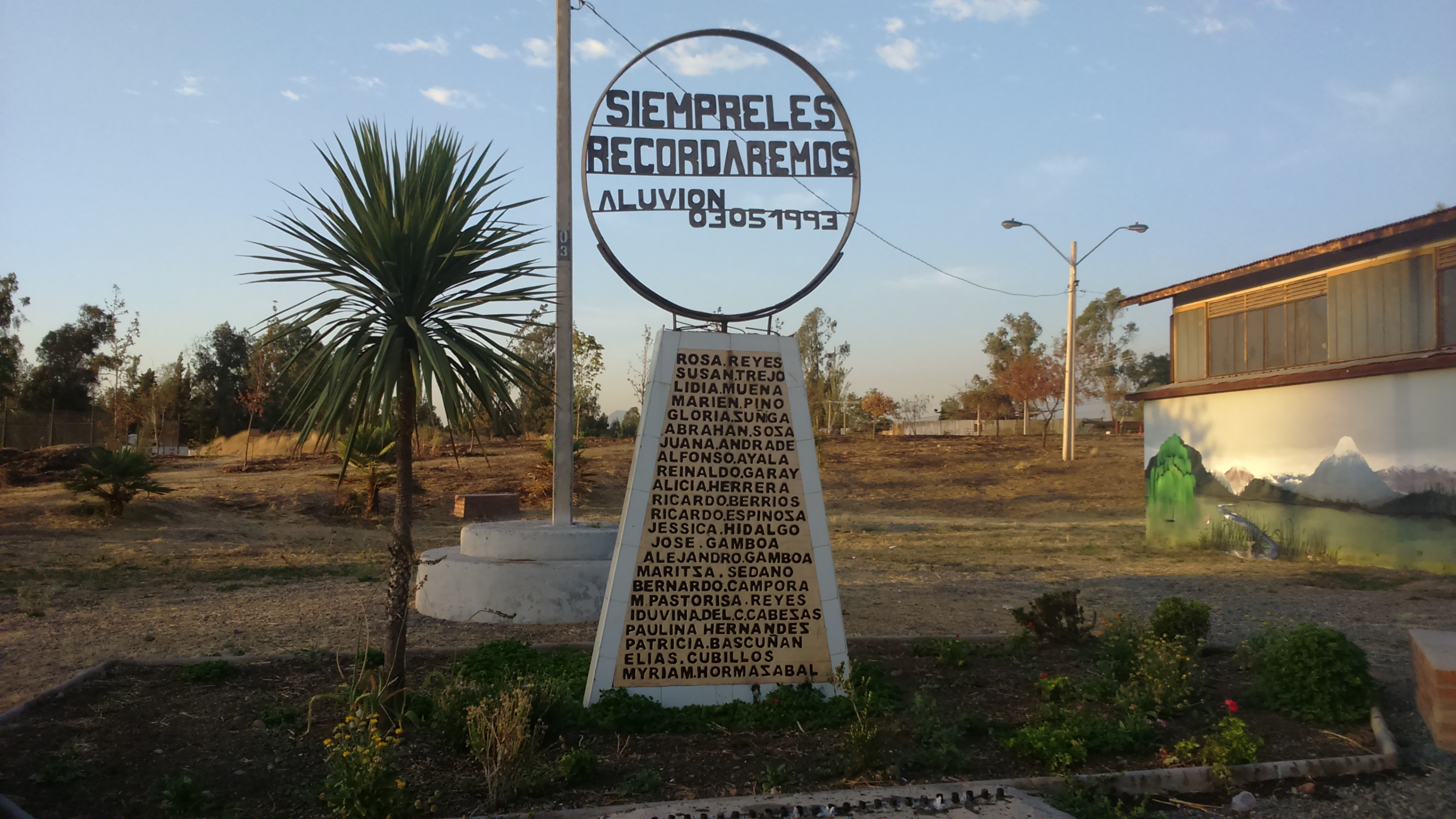 Animita que recuerda a la victimas del aluvión de la quedrada de macul, ocurrido el 3 de mayo de 1993 a las 10:33 AM.